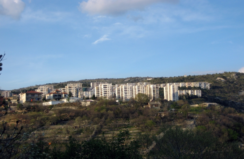 brdo Sveti Križ s kapelicom, Vežica (dio "kineskih zidova" na Gornjoj Vežici i dio Podvežice), Rijeka